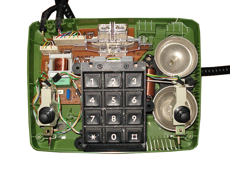 Innenleben eines Telefons Typ FeTAp 754 (ca. 1980)